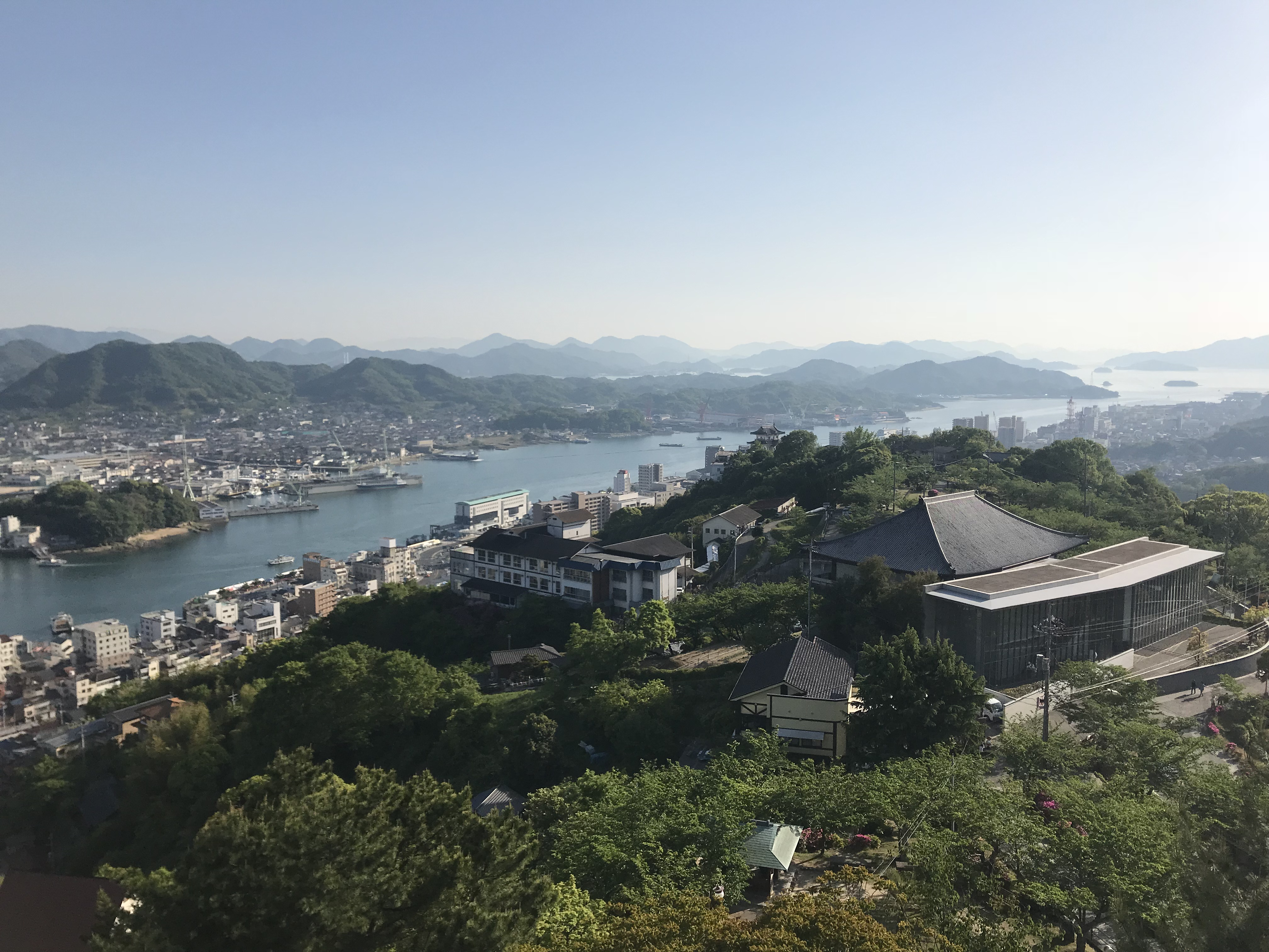 千光寺公園頂上展望台より望む尾道市立美術館と向島・岩子島